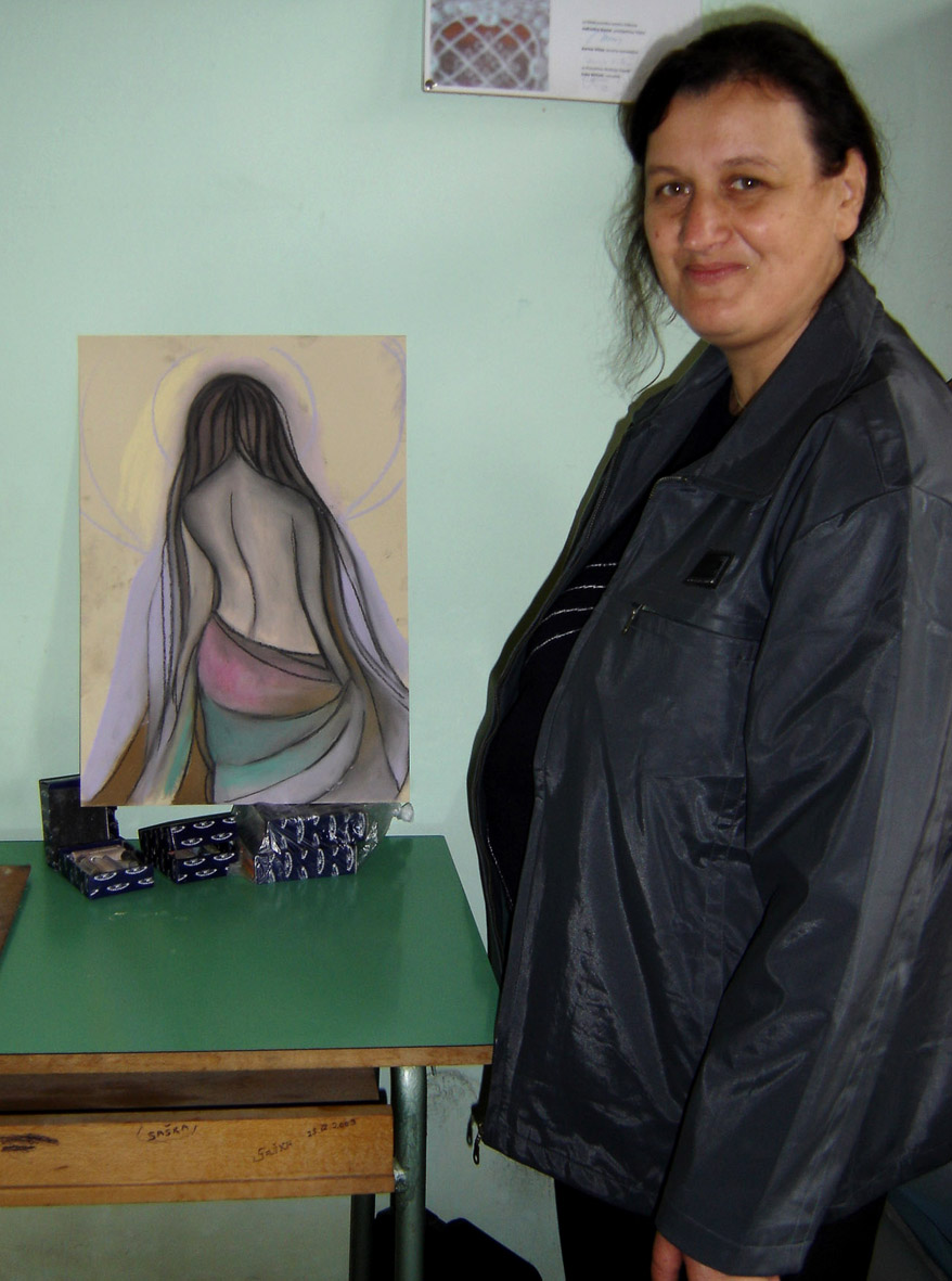 en: Rada Marković, painter from Darda Rada Marković, slikarica iz Darde